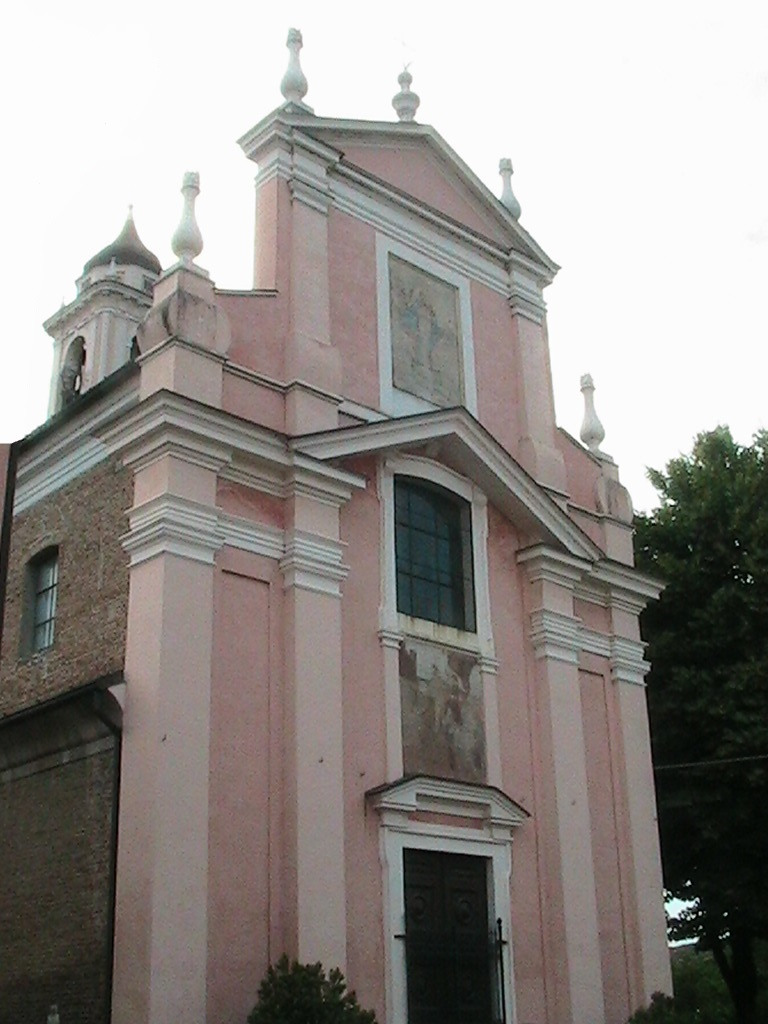 Gabbioneta (Gabbioneta-Binanuova) - Chiesa prepositurale di Sant'Ambrogio